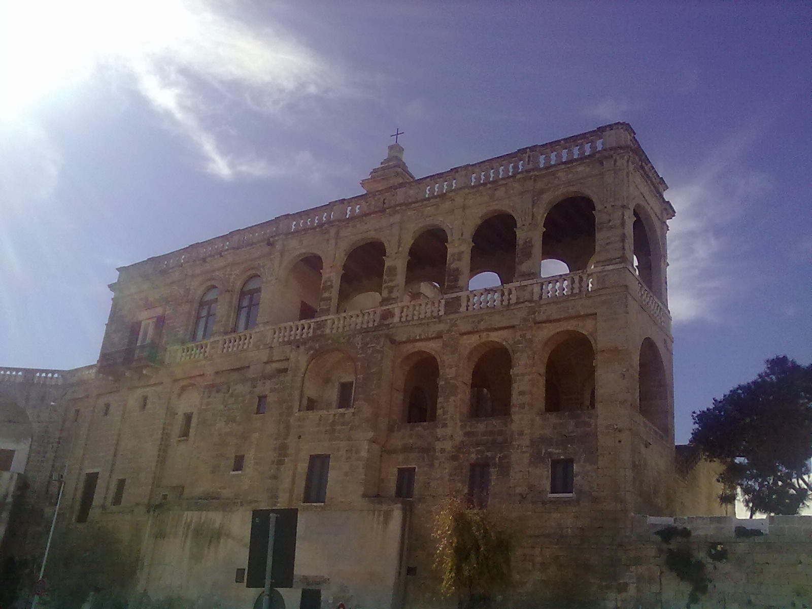 San Vito Abbazia